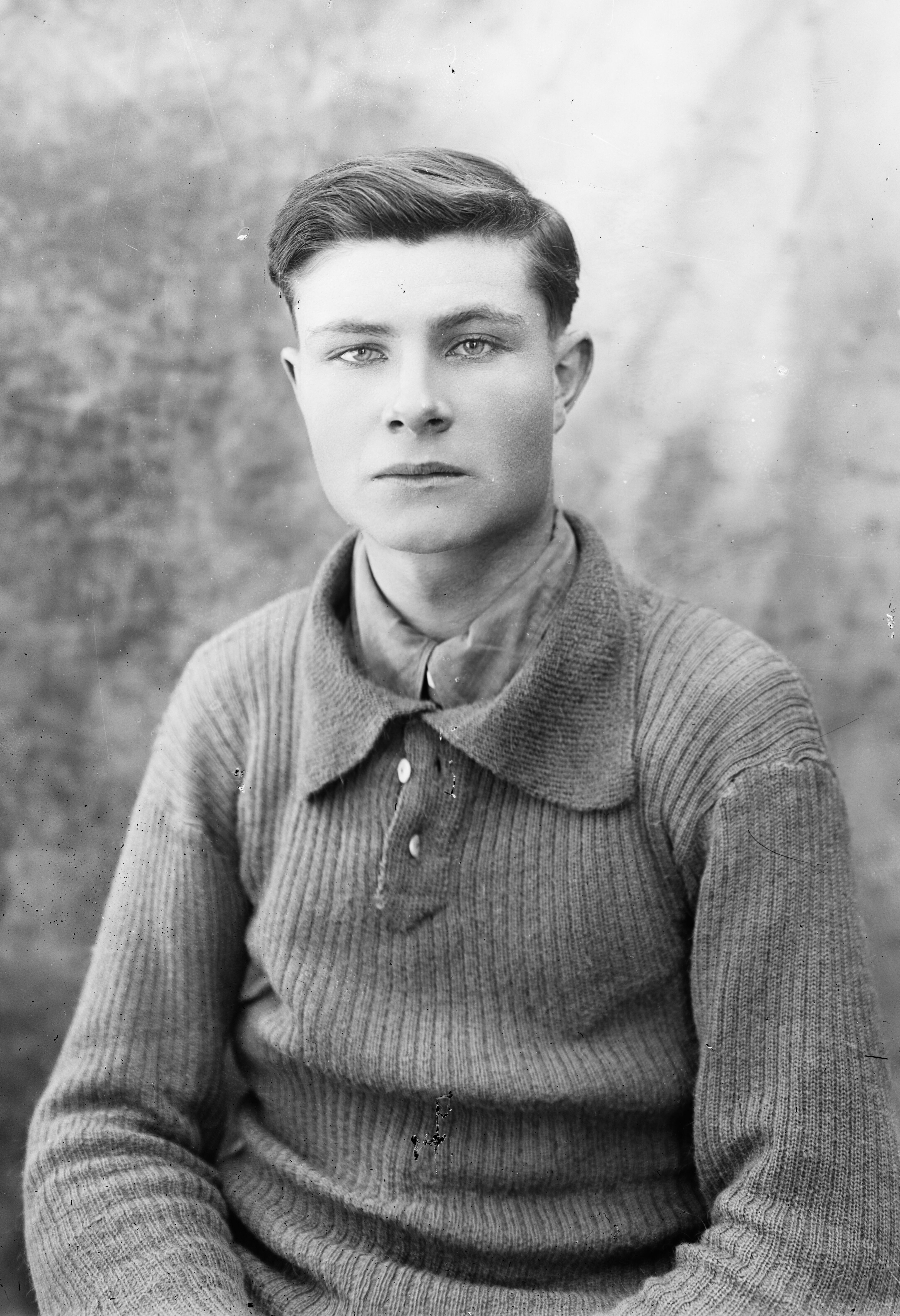 [Portrait du cycliste Achille] Souchard : [photographie de presse] / [Agence Rol]